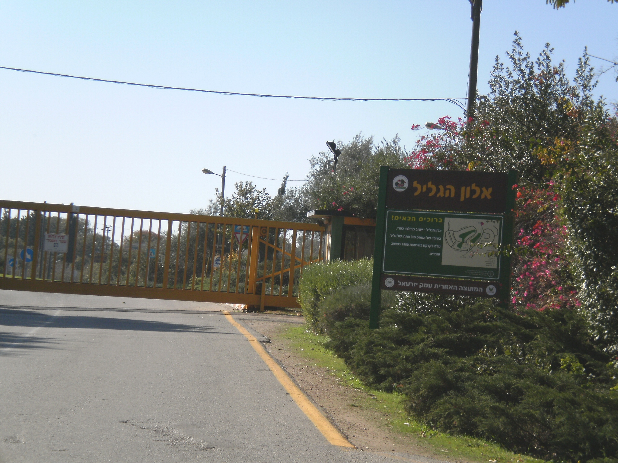 Alon Hagalil, Israel אלון הגליל, ישראל